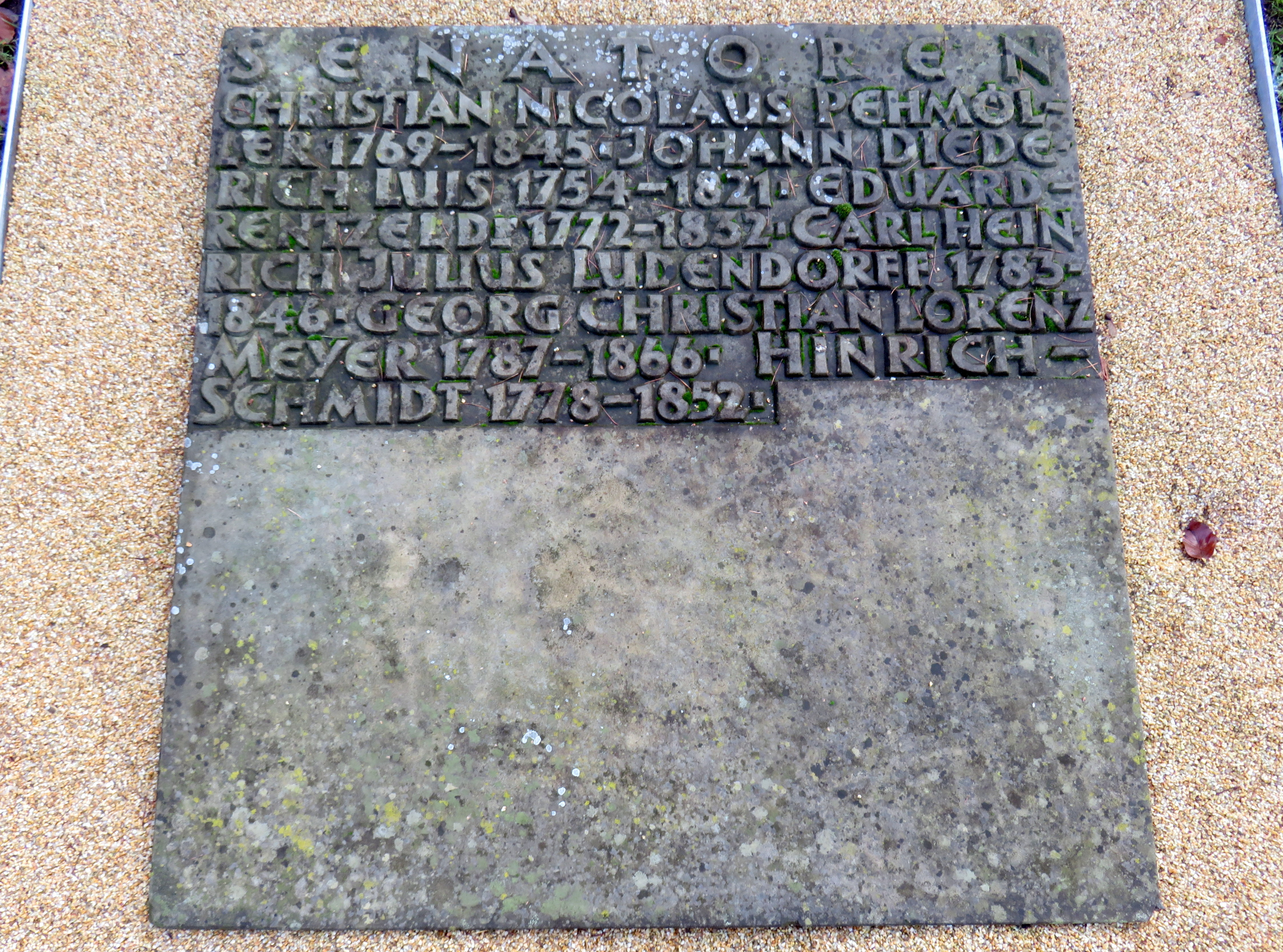 Sammelgrabmal Senatoren (II) im Bereich des Althamburgischen Gedächtnisfriedhofs auf dem Hamburger Friedhof Ohlsdorf zu Ehren von unter anderen Eduard Rentzel.